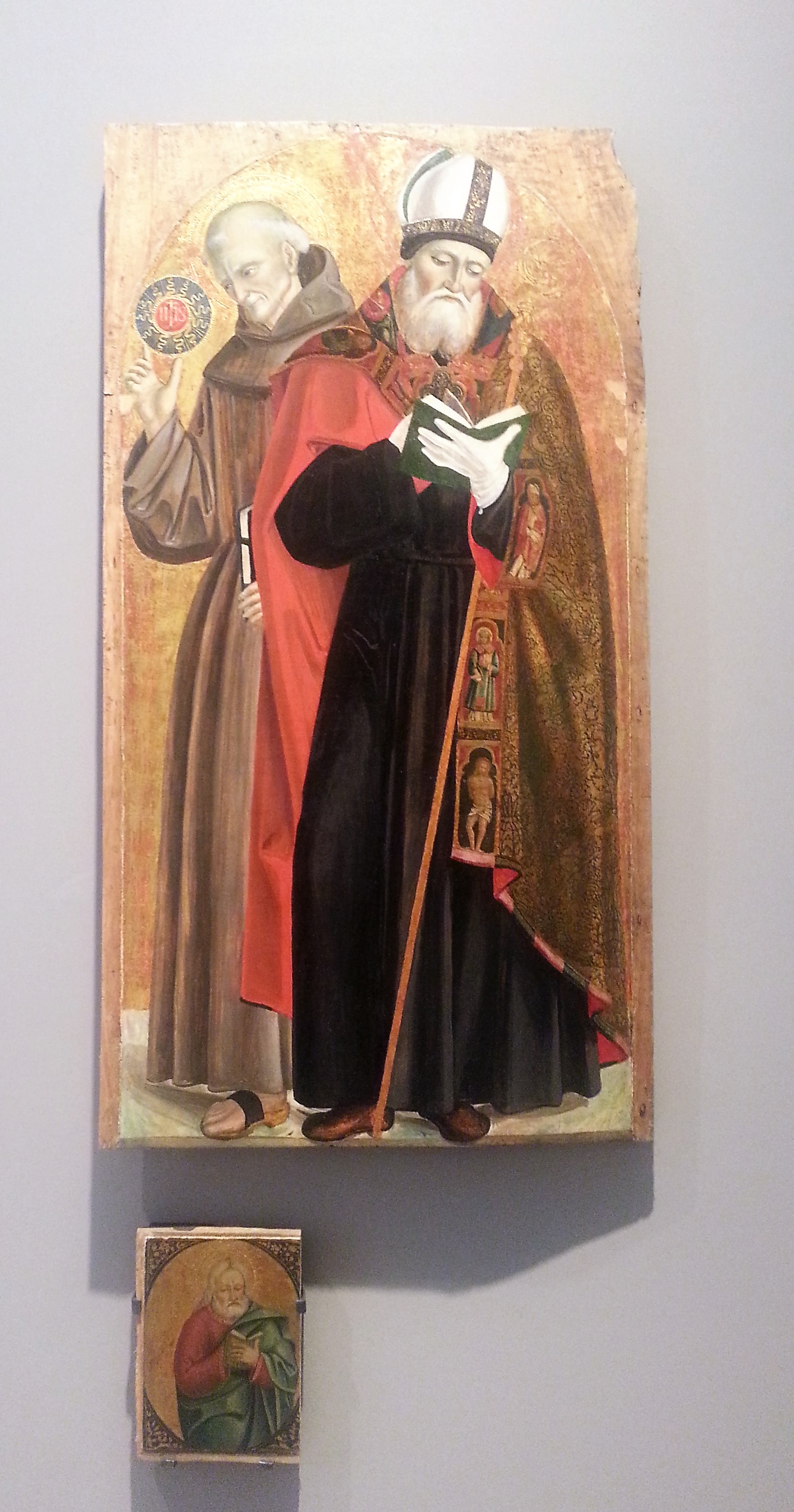 Polittico del Romacolo santi Bernardino da Siena e sant'Agostino